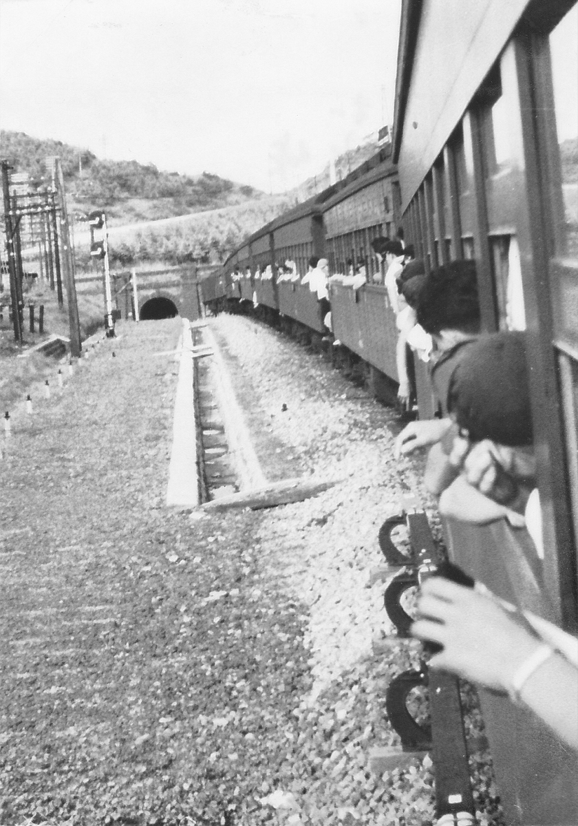 碓氷峠のトンネル入る列車